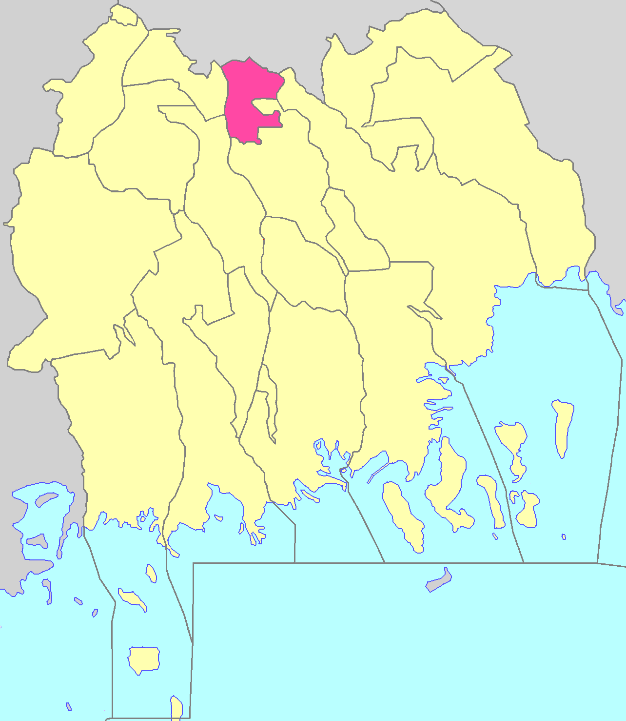 Камизяцьке міське поселення